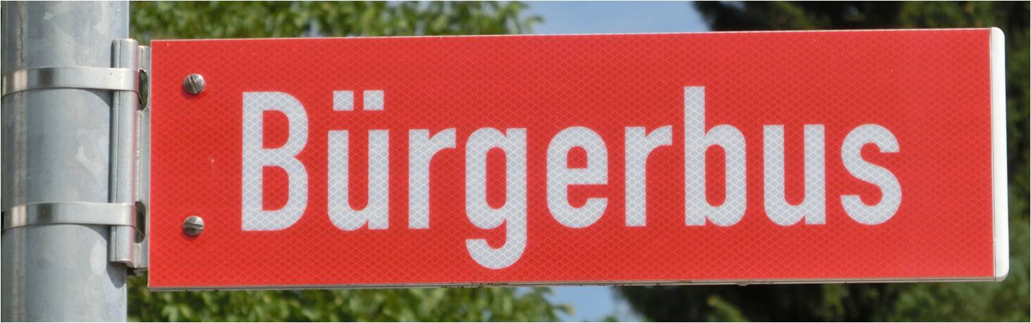 Deutschland (D) - Baden-Württemberg (BW) - Landkreis Sigmaringen (SIG) - Ostrach: Haltestelle "Bürgerbus"